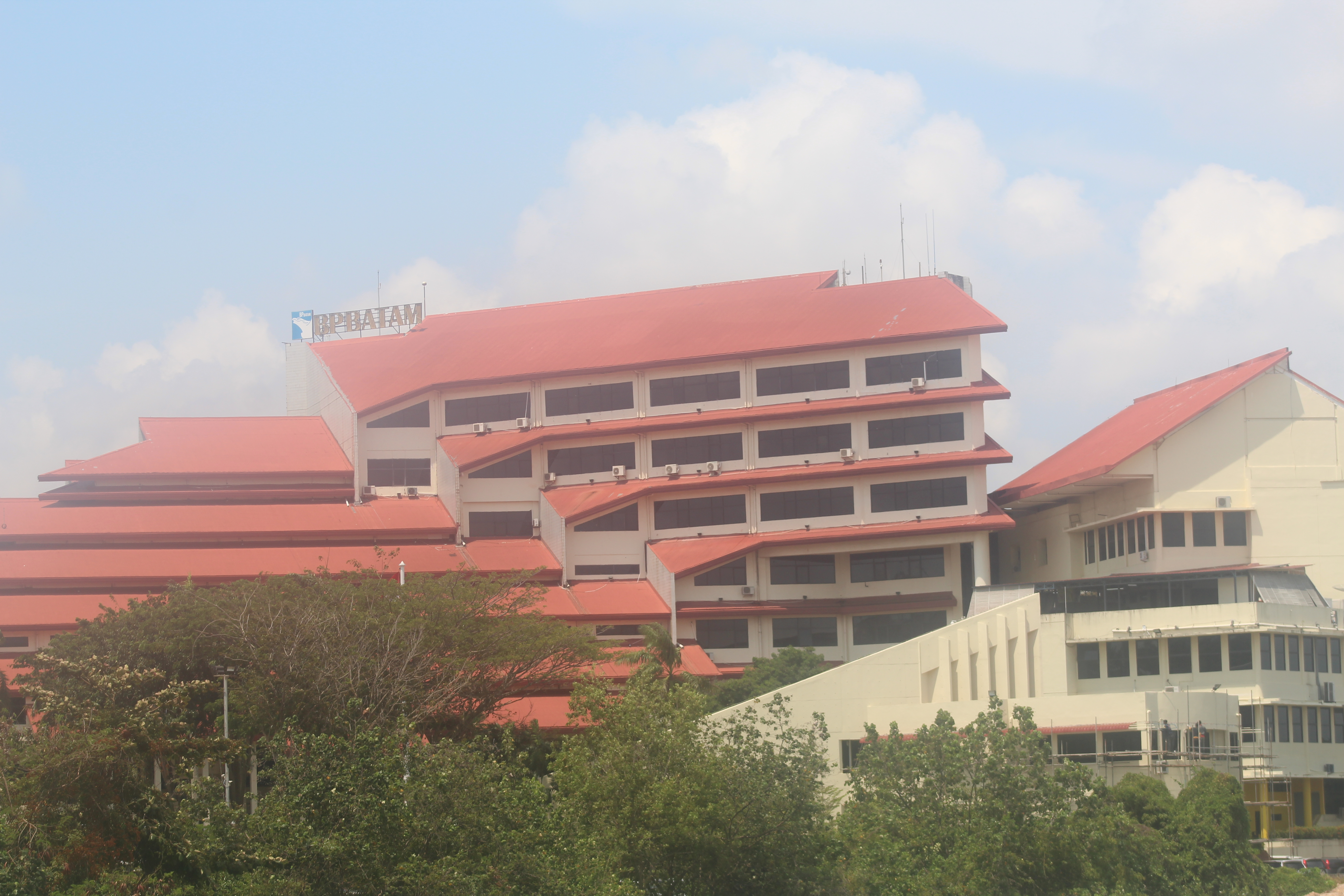 Badan Pengusahaan Kawasan Perdagangan Bebas dan Pelabuhan Bebas Batam (disingkat BP Batam) adalah lembaga/instansi pemerintah pusat yang dibentuk berdasarkan Peraturan Pemerintah Republik Indonesia Nomor 46 Tahun 2007 dengan tugas dan wewenang melaksanakan pengelolaan, pengembangan dan pembangunan kawasan sesuai dengan fungsi-fungsi kawasan. Sebelumnya BP Batam adalah Otorita Pengembangan Daerah Industri Pulau Batam atau lebih dikenal dengan nama Otorita Batam. Berdasarkan Peraturan Pemerintah Nomor 6 tahun 2011 tentang Pengelolaan Keuangan pada Badan Pengusahaan Kawasan Perdagangan Bebas dan Pelabuhan Bebas Batam, BP Batam adalah Lembaga nonstruktural yang berbentuk Badan Layanan Umum.[1] Referensi ↑ Sejarah BP Batam